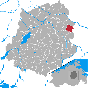 Völschow, Landkreis Demmin, Mecklenburg-Vorpommern